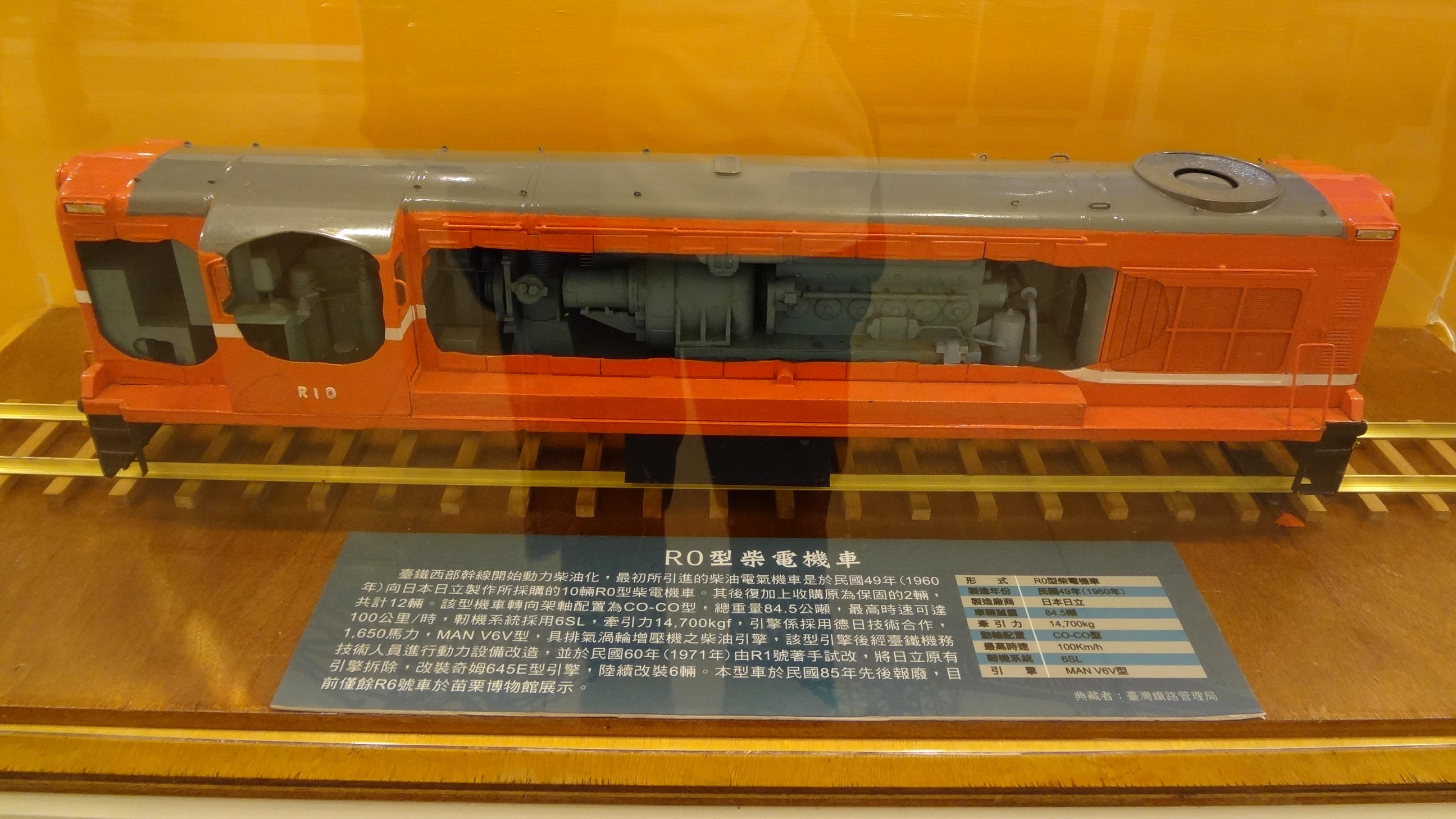 臺灣鐵路管理局R0型柴電機車模型